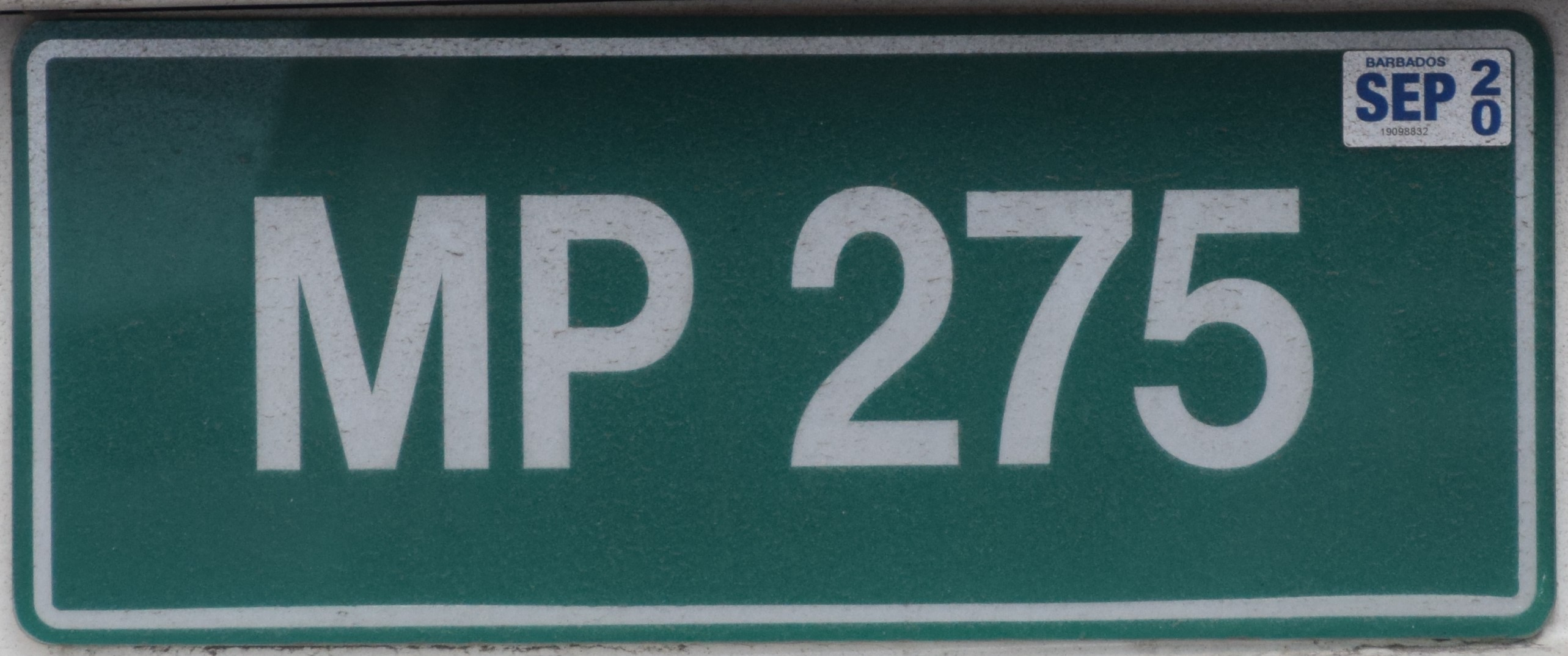 Barbados kentekenplaat politie